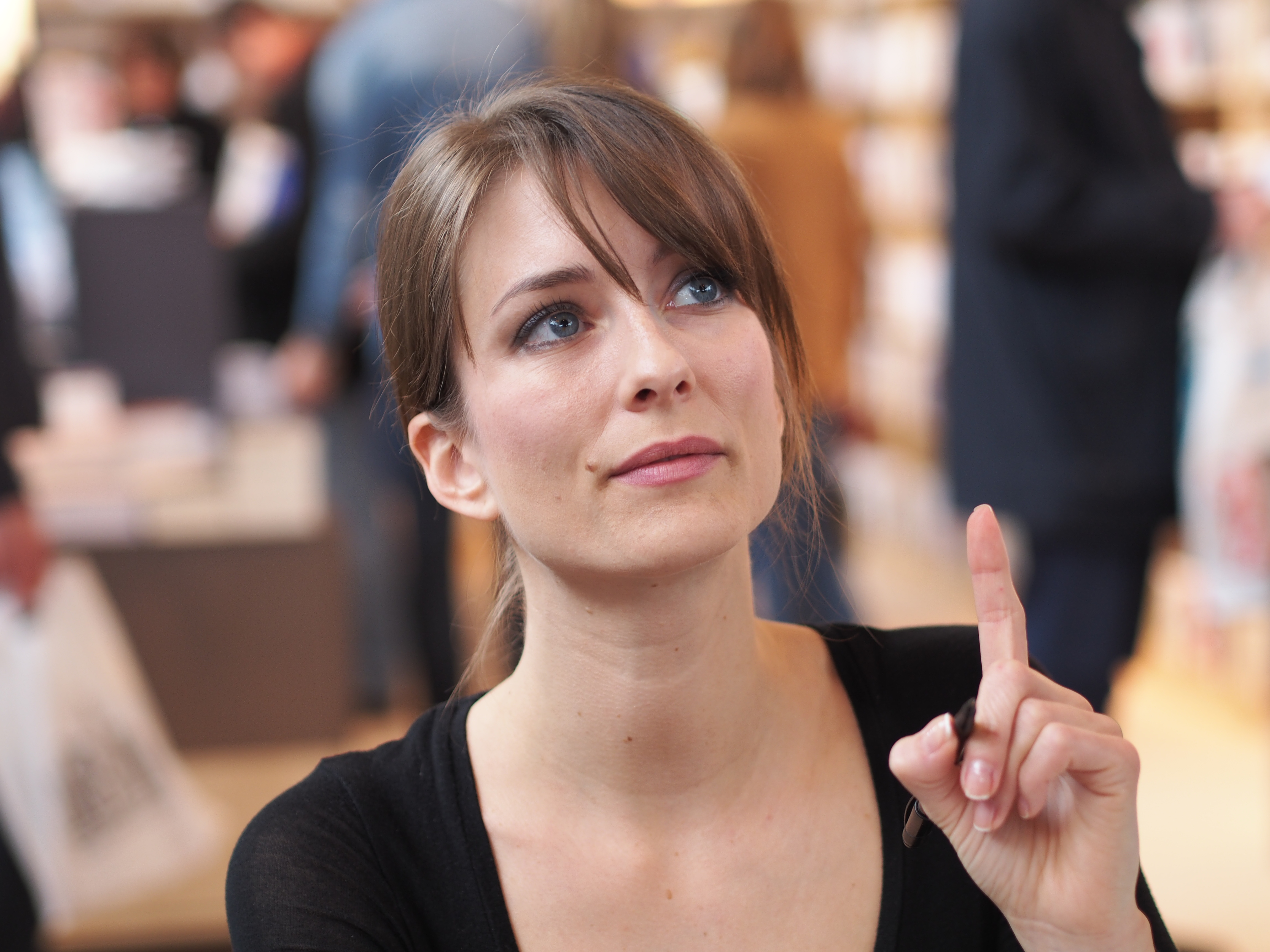 Diane Ducret au Salon du livre de Paris, le dimanche 23 mars 2014.